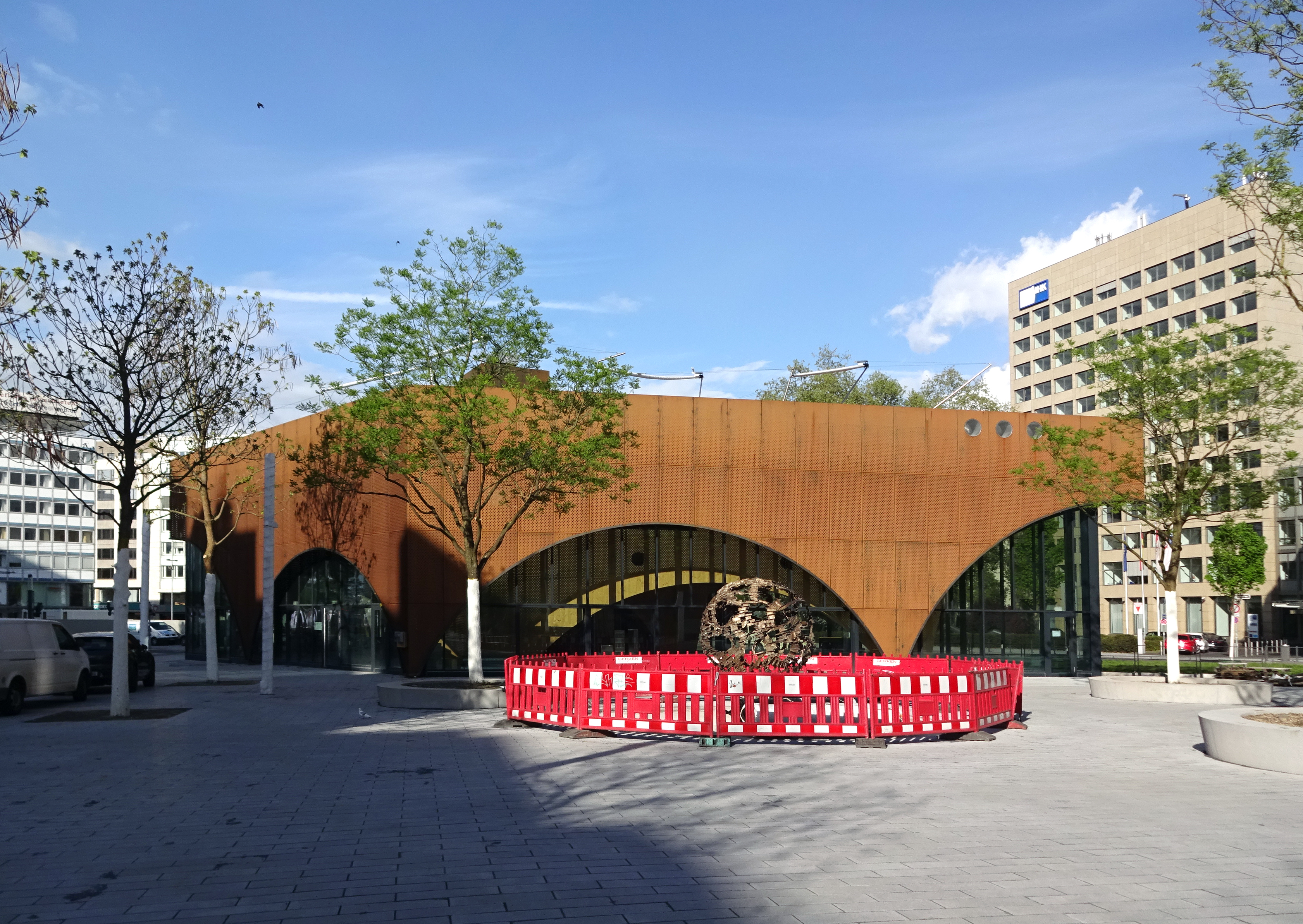 Pavillon am Martin-Luther-Platz und Baustelle des Kugelbrunnens (1964) von Friederich Werthmann in Düsseldorf-Stadtmitte